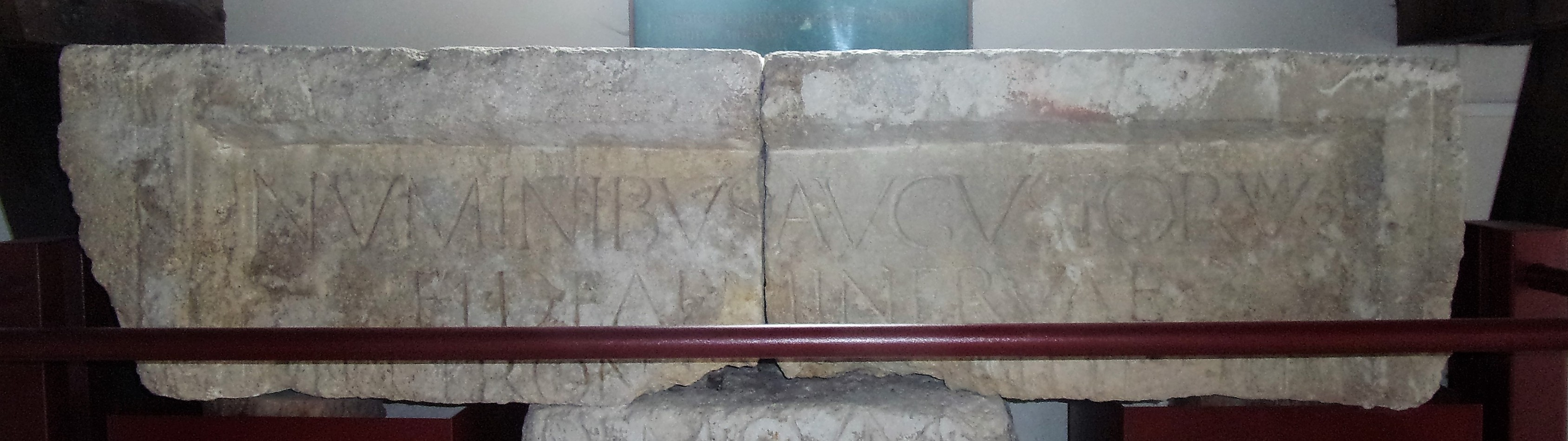 Dédicace lapidaire aux empereurs et à Minerve au musée Minerve d'Yzeures-sur-Creuse; = CIL 13, 3075: Numinibus Augustorum / et deae Minervae / M(arci) Petroni [Gia]milli(?) fili(i) / [3 ae]dem cum s[uis] / [ornamenti]s quam pater fi[eri pro]/[mis]erat d(e) s(uo) p(onendum) c(uraverunt)